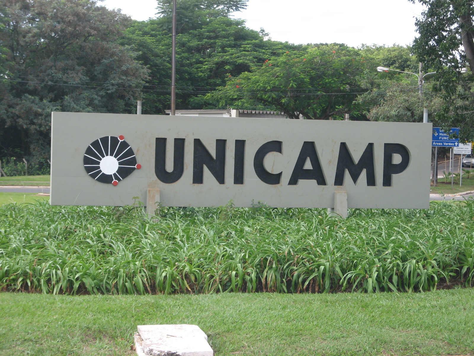 Monumento de pedra em uma das entradas da Unicamp.